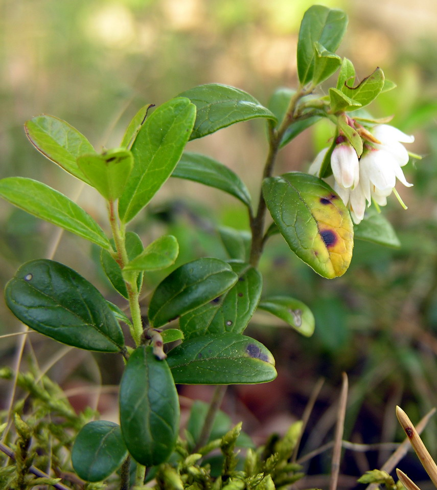 Žydinti bruknė (Vaccinum vitis-idaea) Šeima. Erikiniai (Ericaceae) Foto: Algirdas, 2006 m. birželio 3 d.